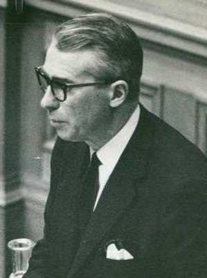 Gösta Bohman (1911-1997), svensk politiker